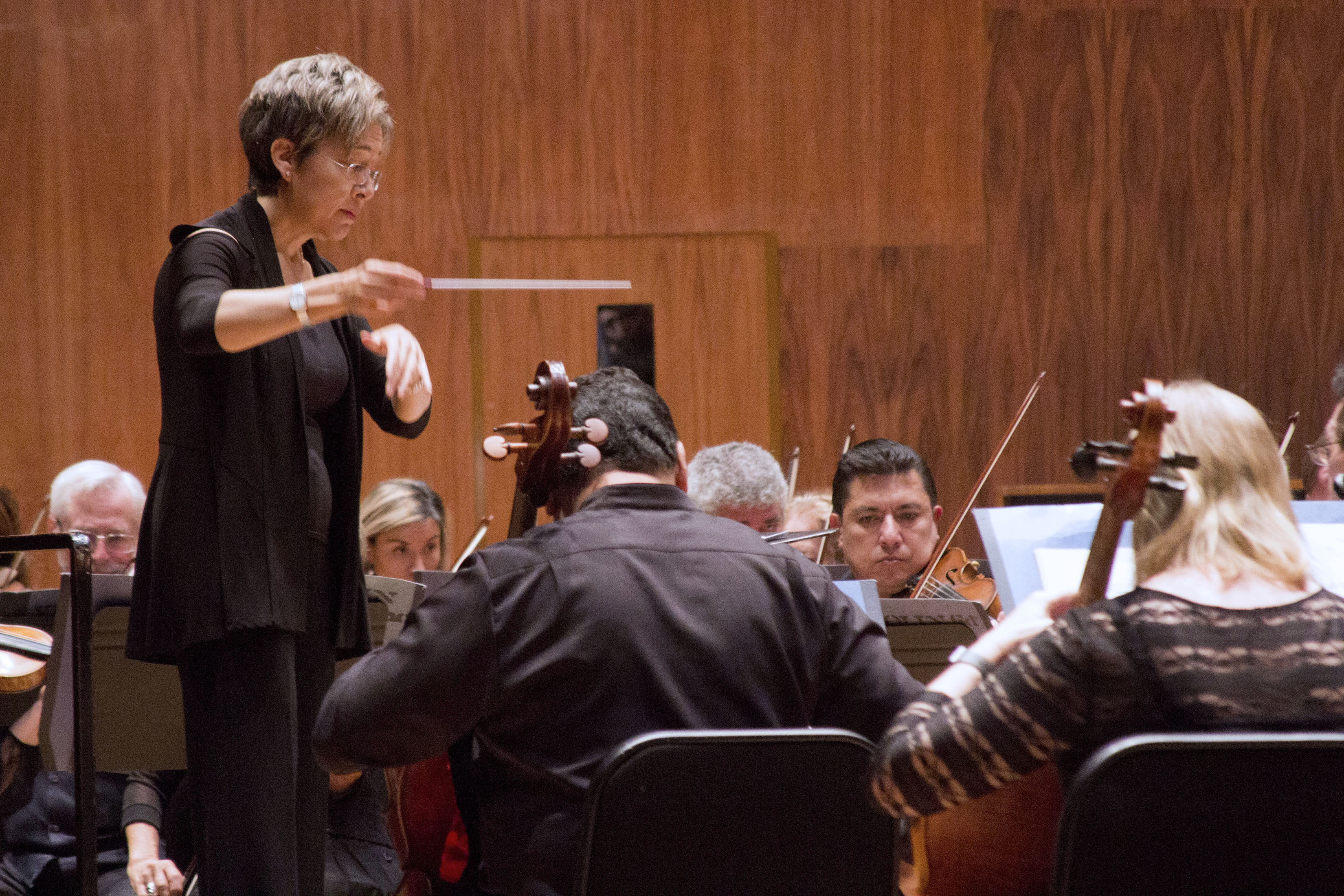 Domingo 2 de diciembre de 2018 En el Centro Cultural Ollin Yoliztli, la Orquesta Filarmónica de la Ciudad de México, bajo la dirección de la maestra huésped Gabriela Díaz Alatriste ofreció el penúltimo concierto de la Temporada 2018 con las obras: de Jesús Villaseñor, Altiplanos; de Franz Joseph Haydn, Sinfonía núm. 49, La Pasión, y de Edward Elgar, Variaciones Enigma. Fotografía: Maritza Ríos / Secretaría de Cultura CDMX Domingo 2 de diciembre de 2018 En el Centro Cultural Ollin Yoliztli, la Orquesta Filarmónica de la Ciudad de México, bajo la dirección de la maestra huésped Gabriela Díaz Alatriste ofreció el penúltimo concierto de la Temporada 2018 con las obras: de Jesús Villaseñor, Altiplanos; de Franz Joseph Haydn, Sinfonía núm. 49, La Pasión, y de Edward Elgar, Variaciones Enigma. Fotografía: Maritza Ríos / Secretaría de Cultura CDMX